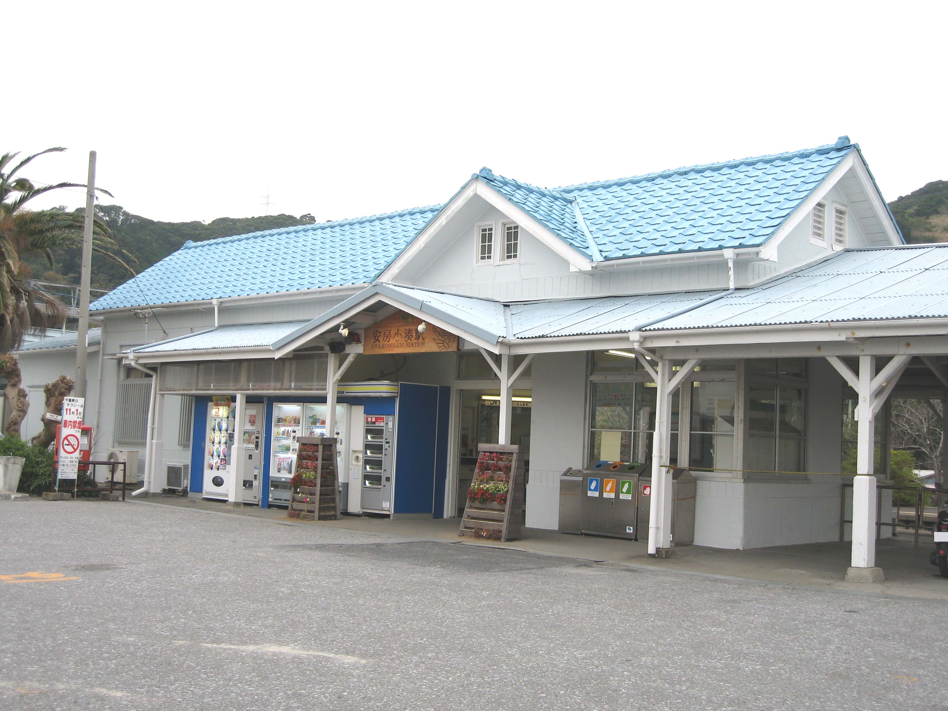 Awakominato station, Sotobo Line, Chiba, Japan, 安房小湊駅駅舎